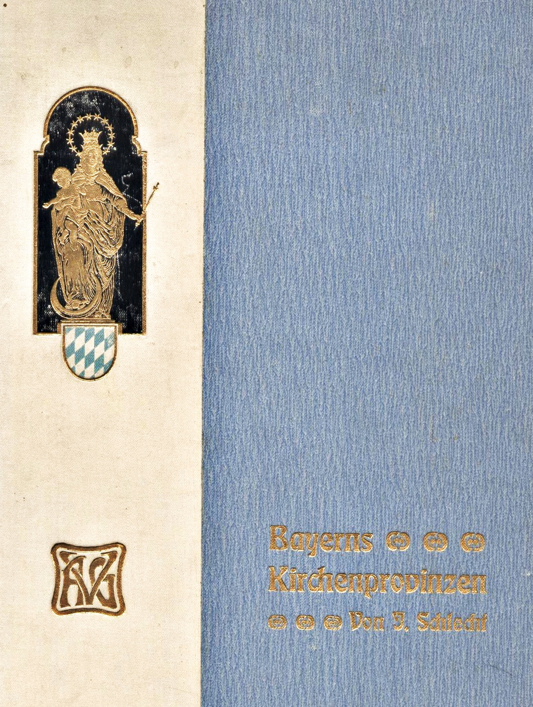 Prälat Joseph Schlecht (1857-1925). Buchtitel des von ihm 1902 publizierten Standardwerkes "Bayerns Kirchenprovinzen".